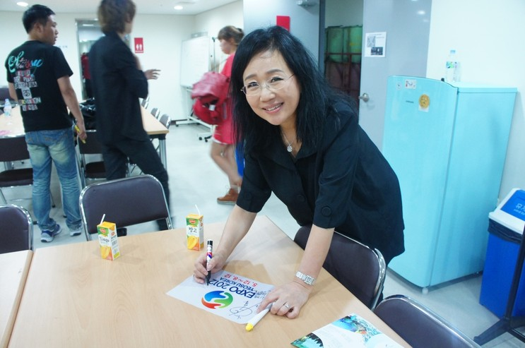 가수 신형원